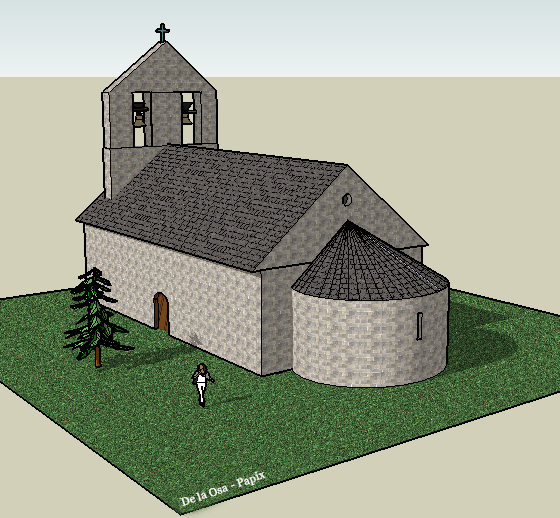 Reproduccion en 3d de la Ermita de Sant Quirc de Durro /( Cataluña )